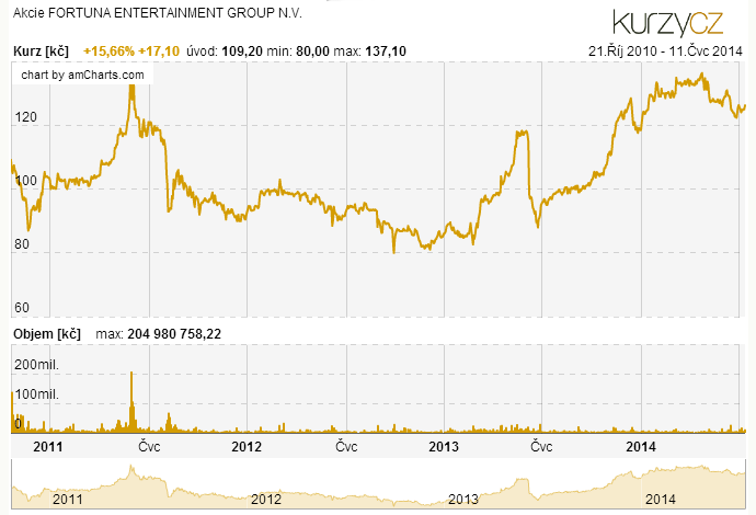 Akcie FORTUNA - Graf vývoje kurzu na Burze Praha.